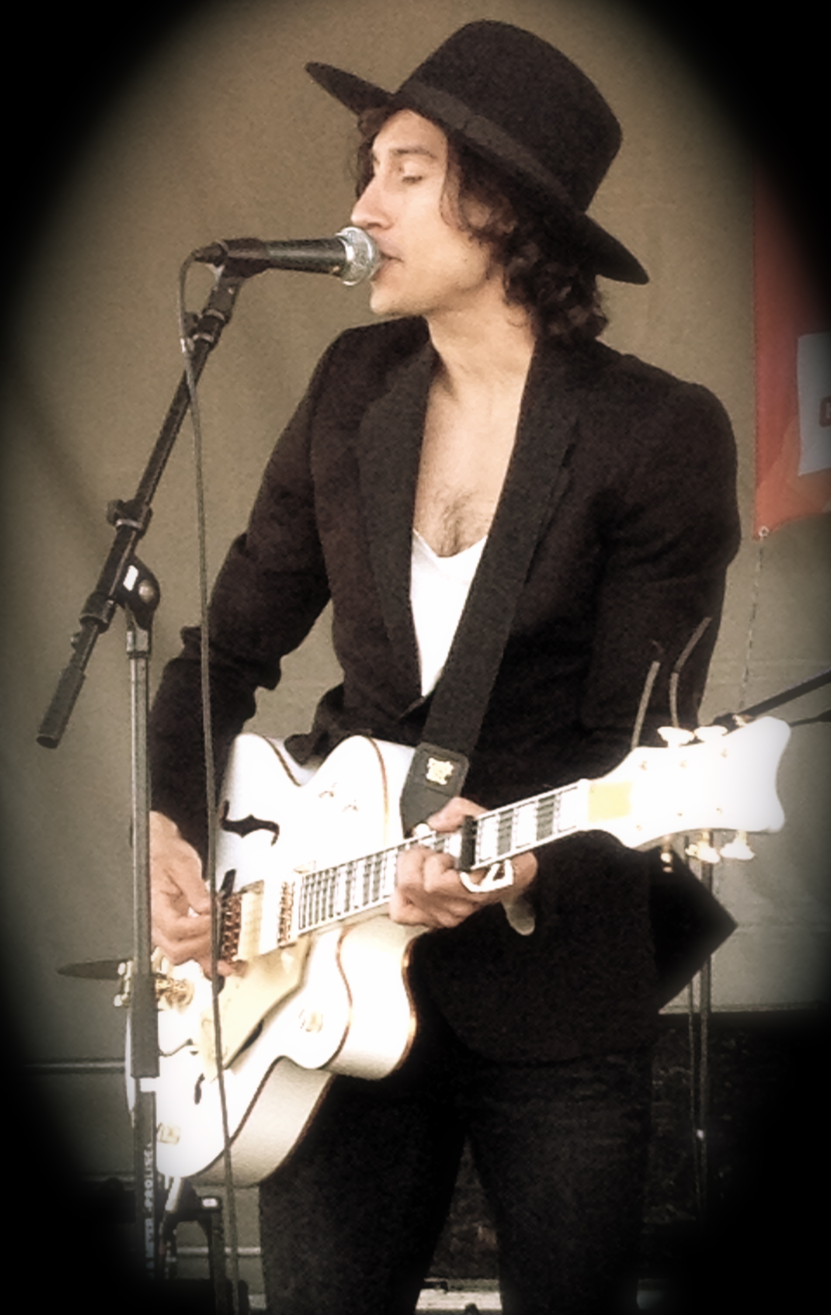 Kristian Anttila 2012